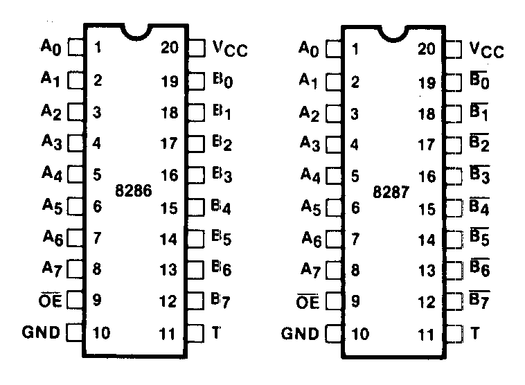 Pinout 8286 8287